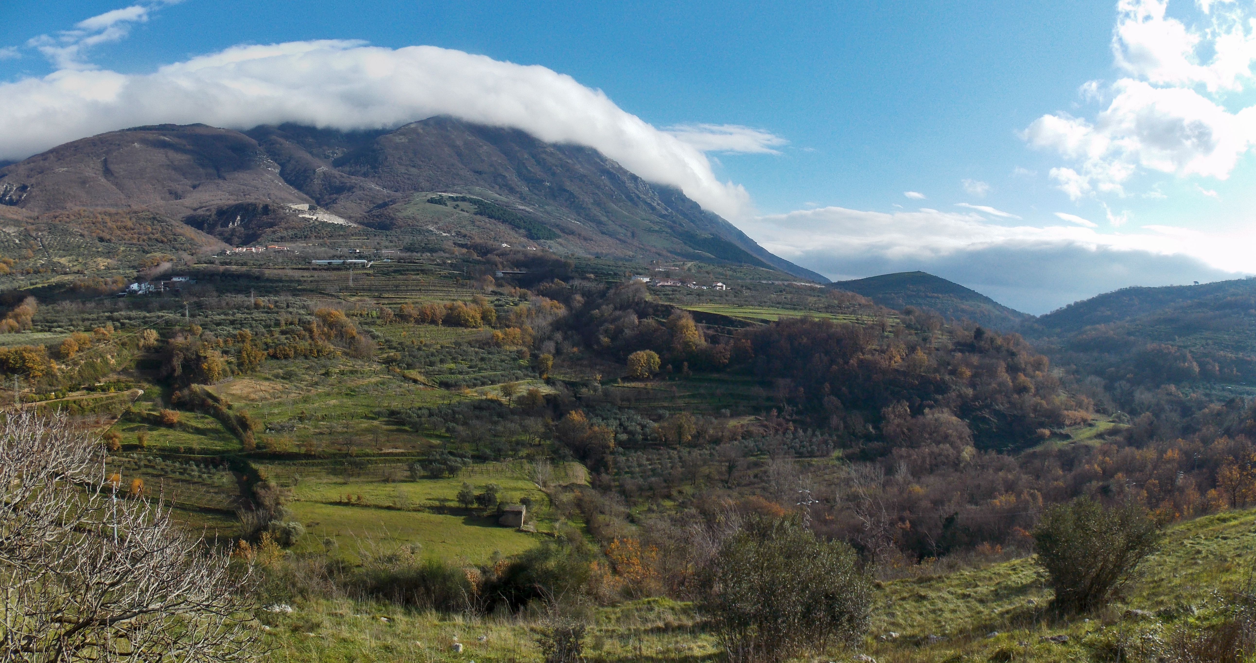 Un tratto della gola del fiume Isclero, nel comune di Sant'Agata de' Goti, in provincia di Benevento